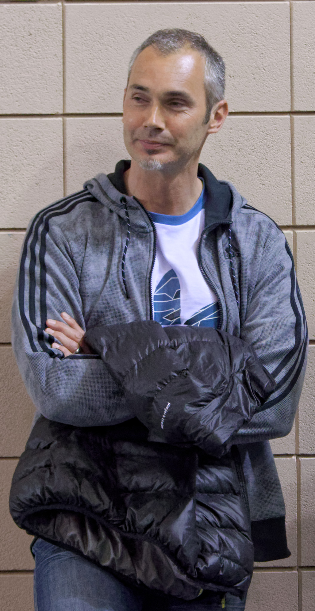 Demie-finale aller de playoff entre Issy Paris Hand et Fleury. A Issy Les Moulineaux, le 22 avril 2016.